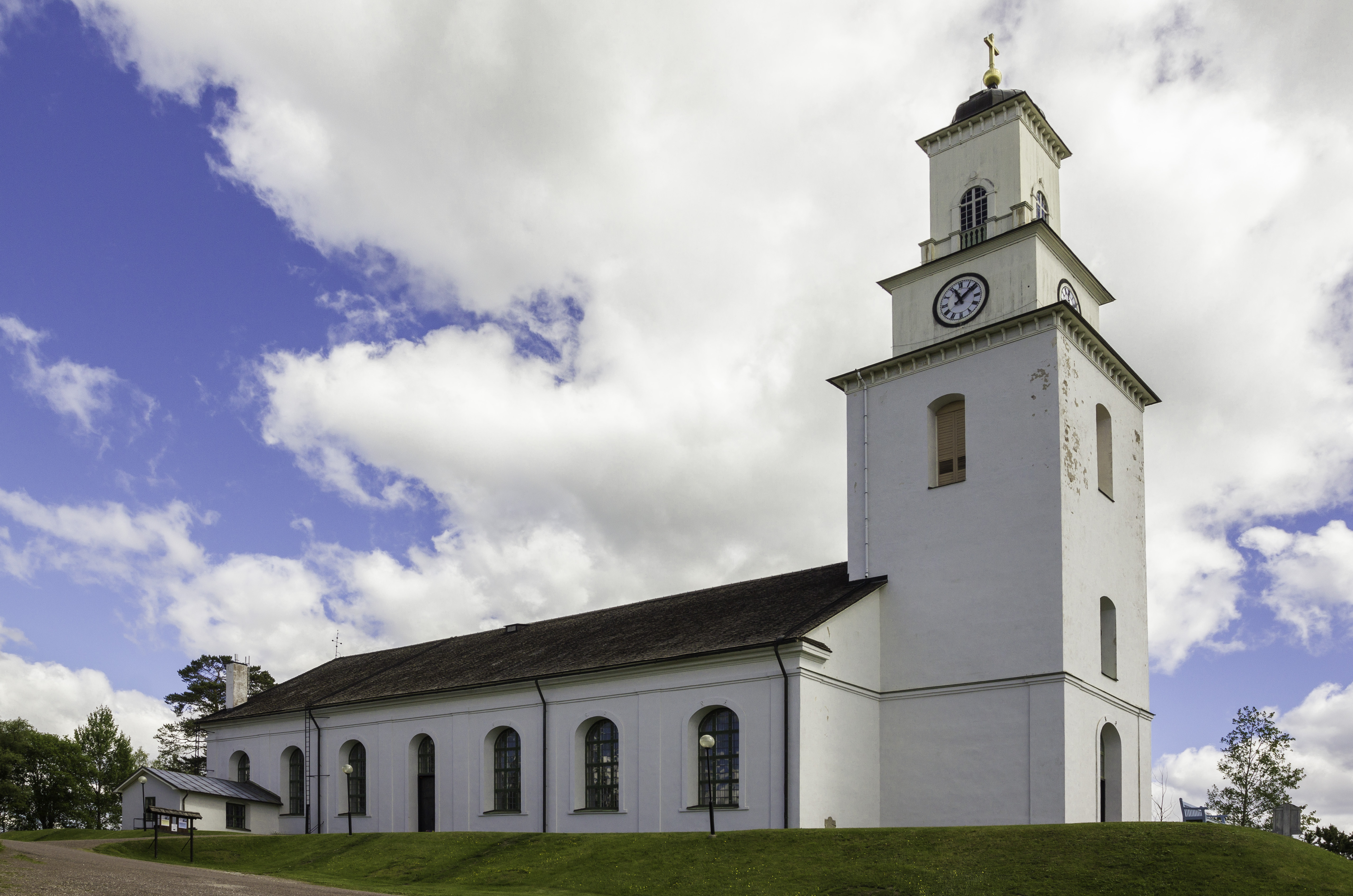 Boda kyrka (Boda 22:14)